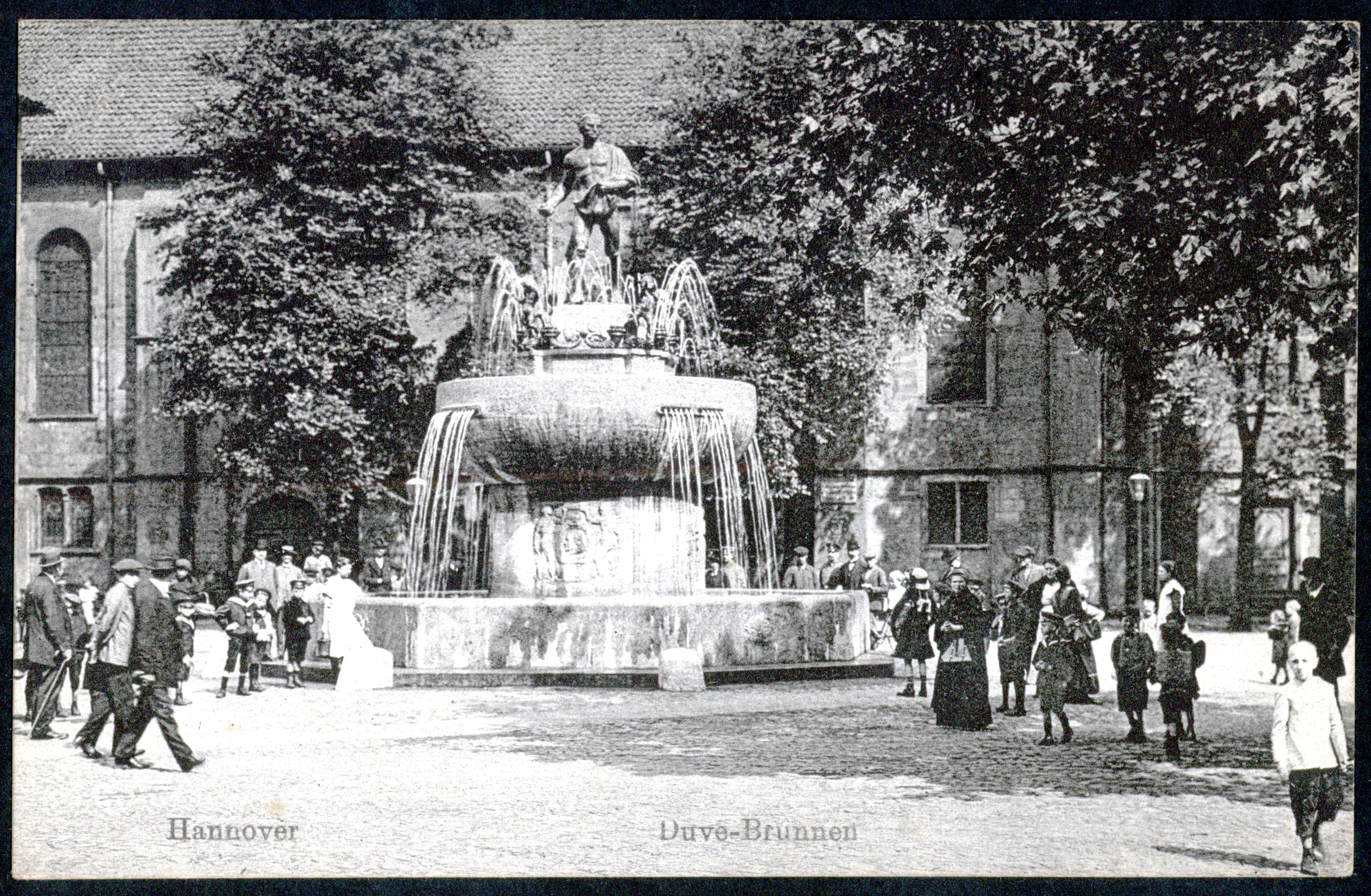 Duve-Brunnen in Hannover, auf dem Neustädter Markt; ursprünglicher Zustand (vor 1942) mit dickem Schaft, großer Brunnenschale, Wasserstrahlen aus einzelnen Öffnungen der Schale und Putten